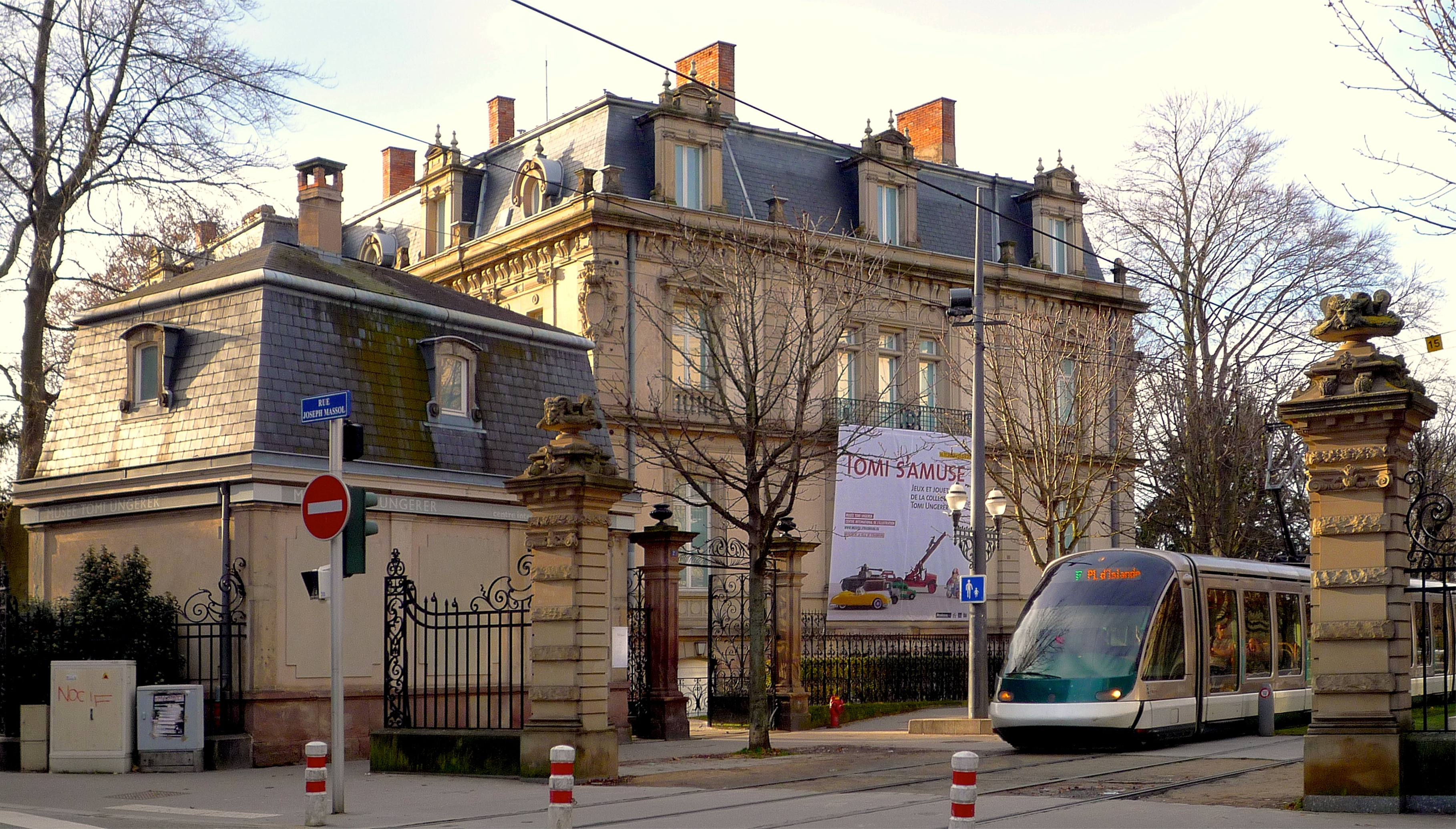 Strasbourg Musée Tomi Ungerer décembre 2012